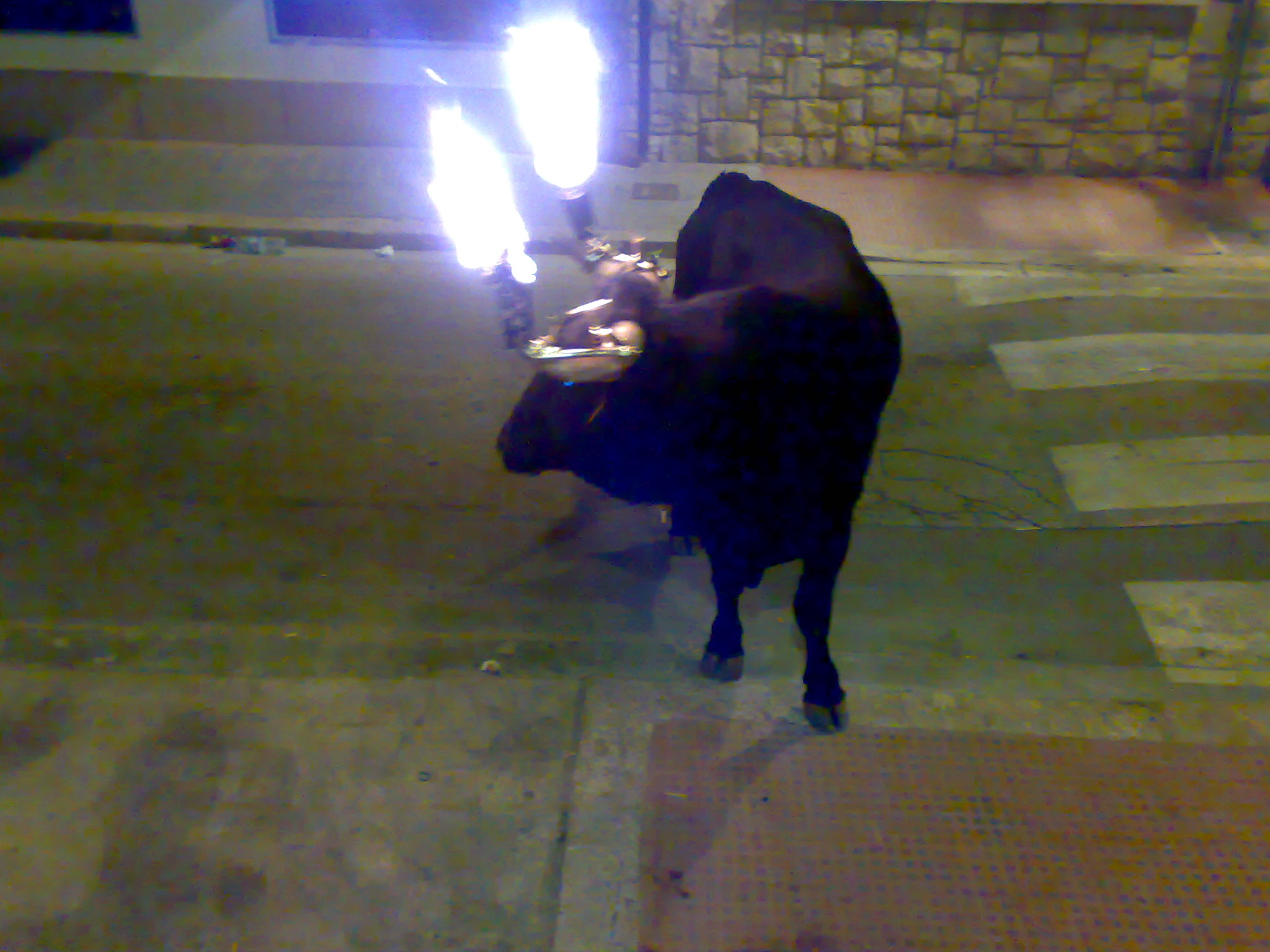 Bou embolat a Godella (ramaderia La Cometa). És el bou d'aquesta notícia.